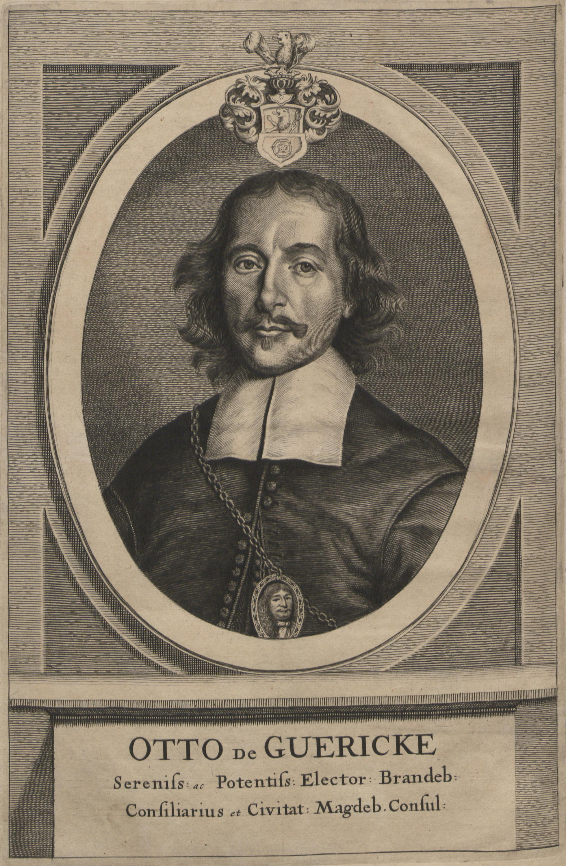 Porträt des Otto von Guericke, Kupferstich